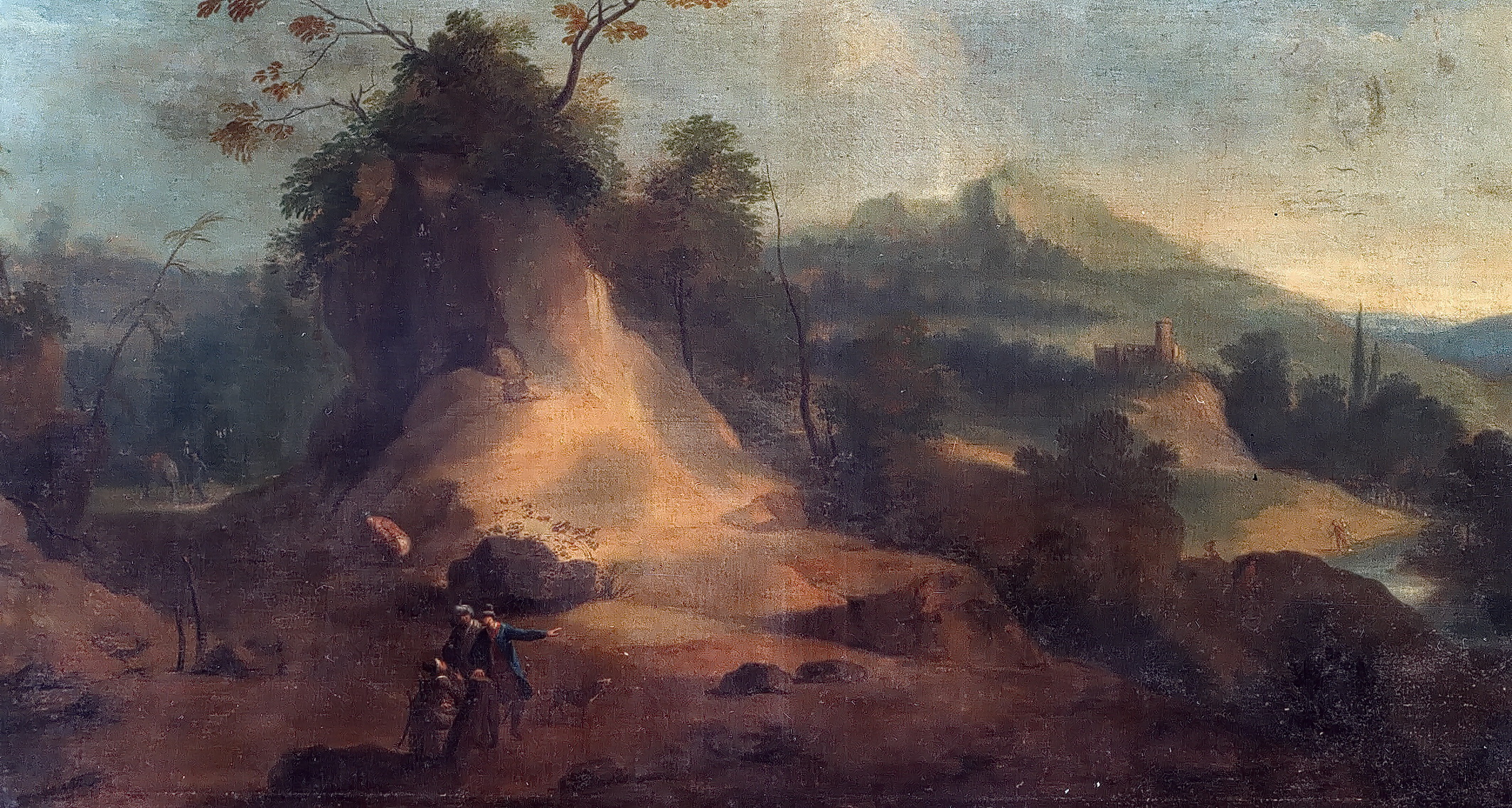 dessus de porte landscape painting